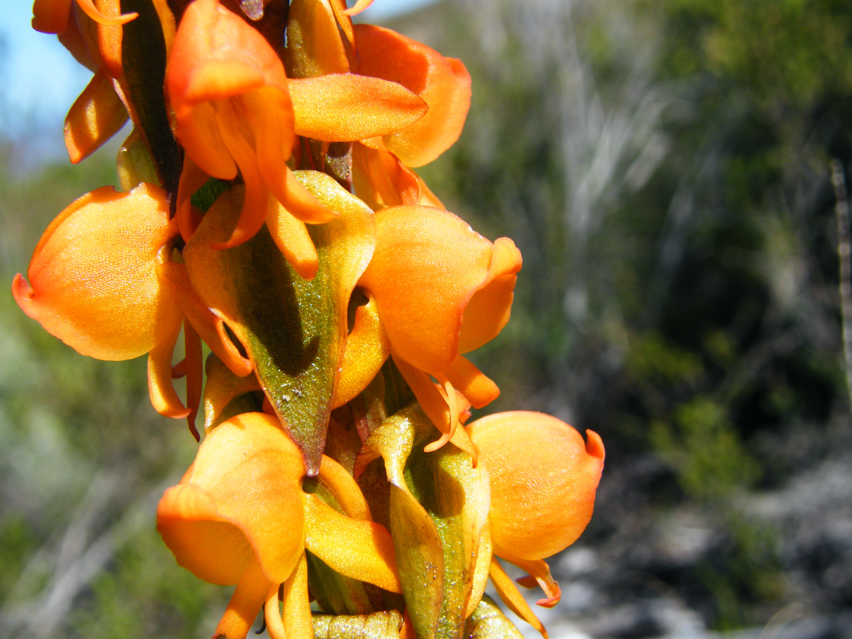 Ewwatrewwa